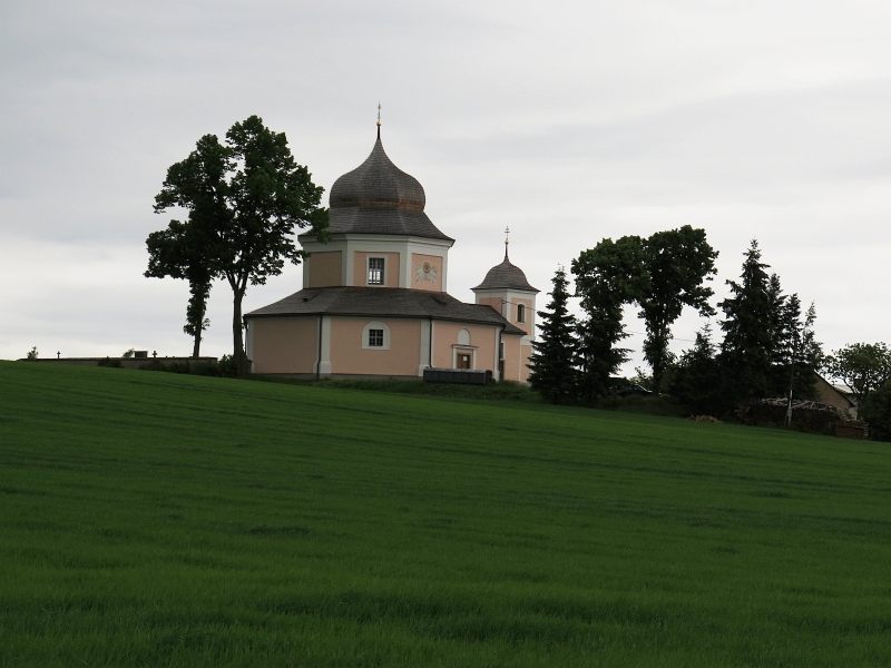 Kostel svaté Barbory, návrší nad obcí, Pročevily.